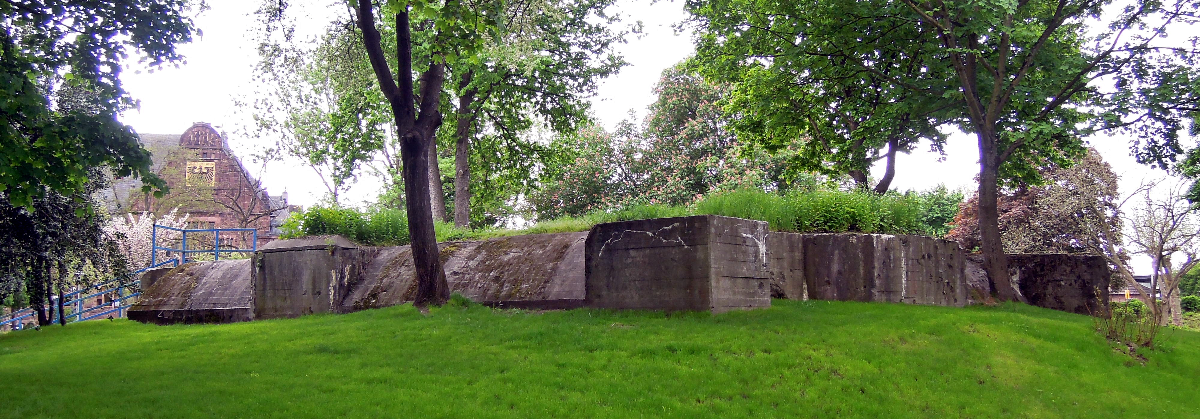 Bunker im Stadtpark